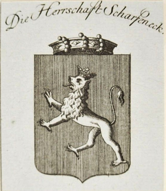 Wappenstich Herrschaft Scharfeneck, heute in Rheinland-Pfalz